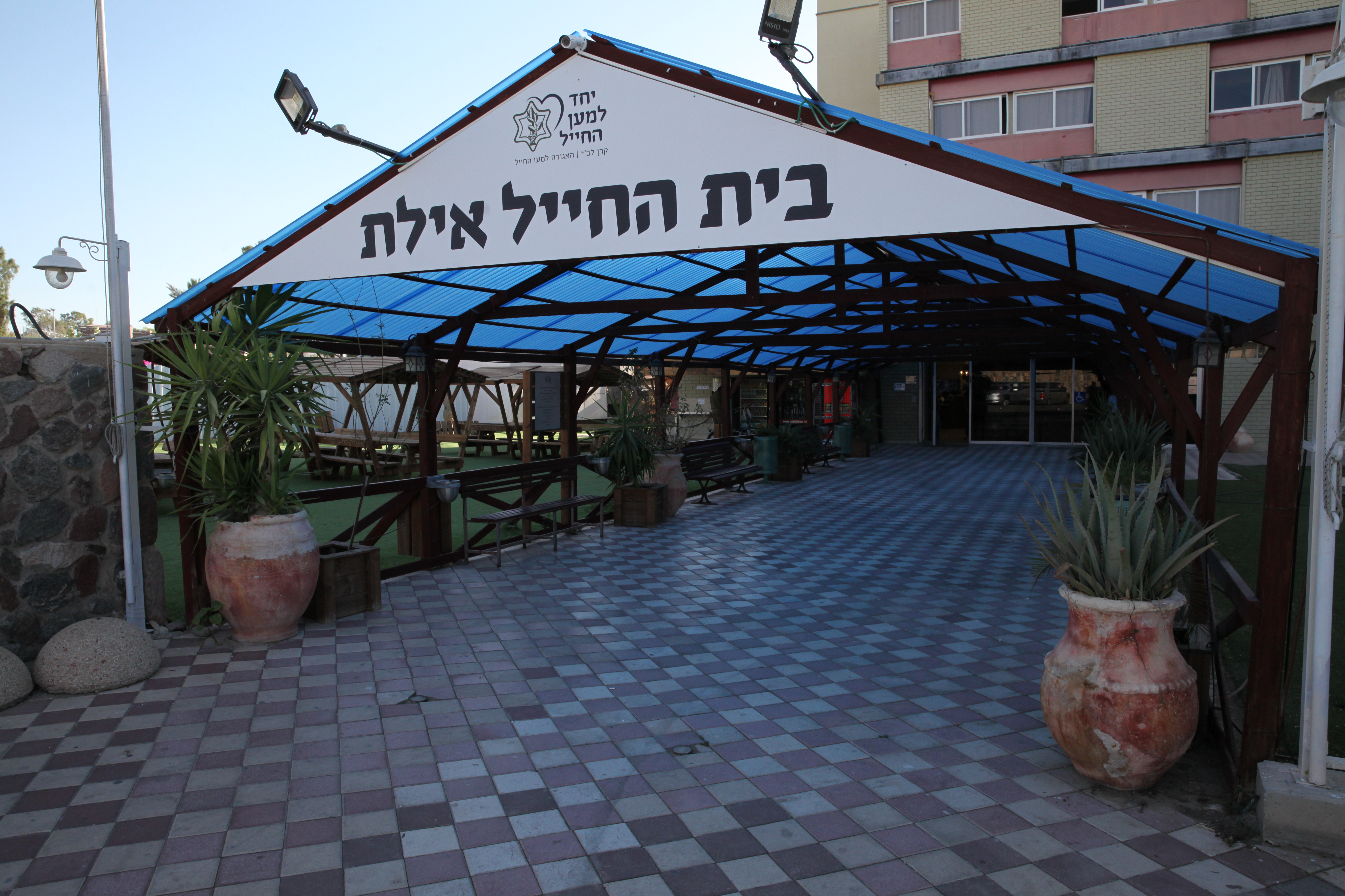 הכניסה לבית החייל אילת